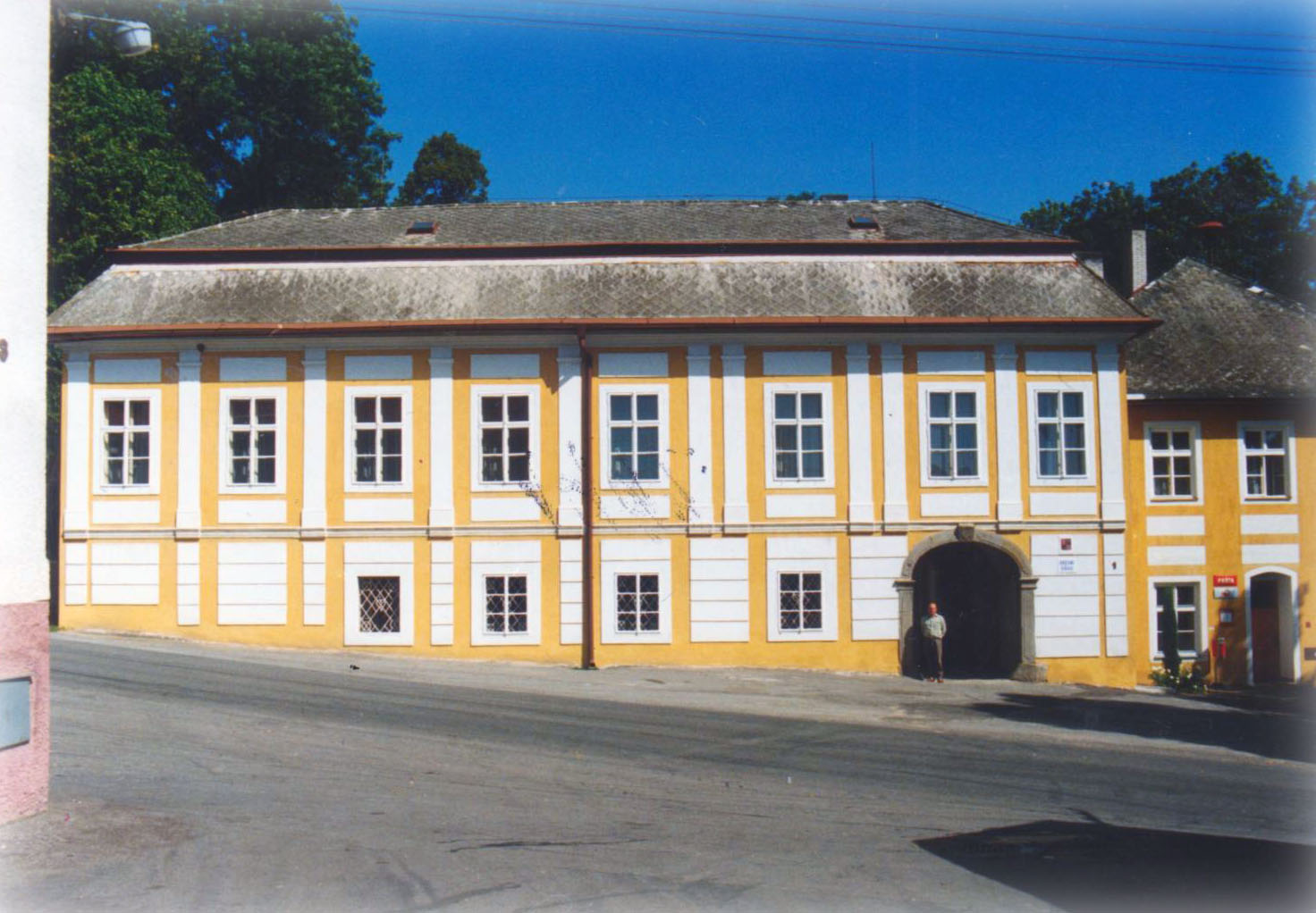 Vstup do zámku